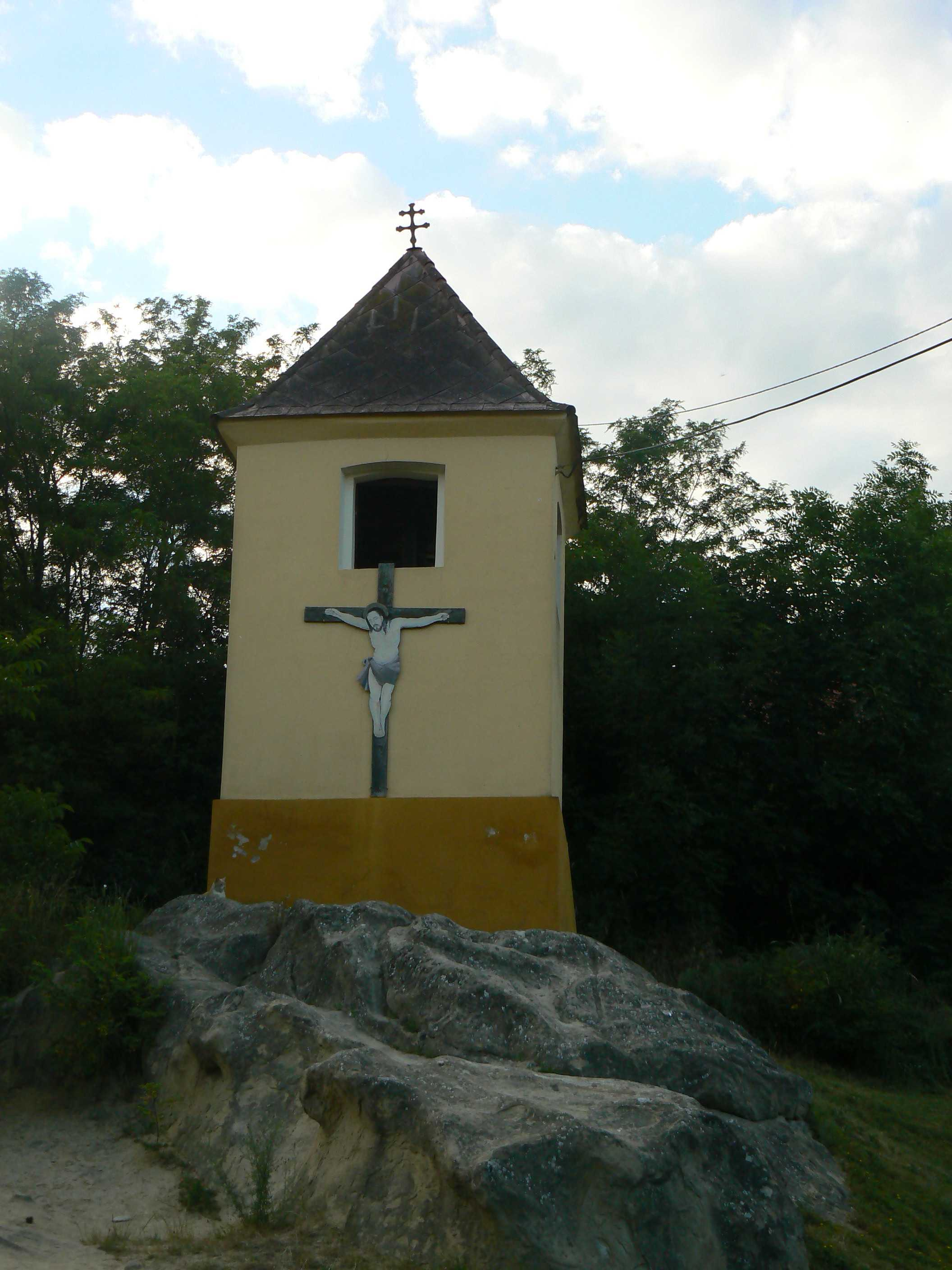 Zvonice v Blišicích